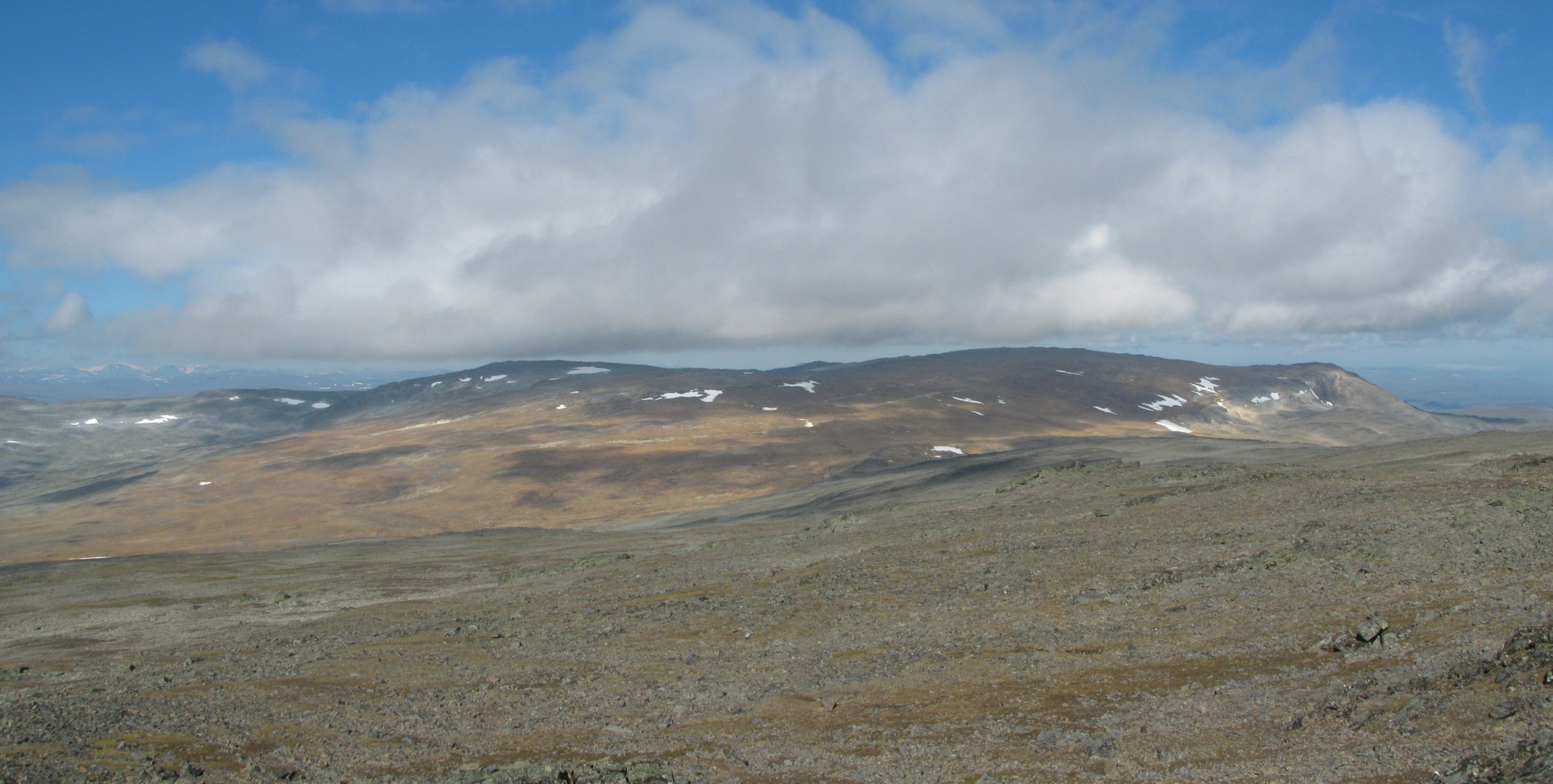 Halti Ritnicohkkalta nähtynä, kuvan keskikohdan vasemmalla puolen näkyy Haldicohkka ja oikealla kohoaa tunturin korkein huippu, Ráisduattarháldi. Kuva on yhdistetty kuvankäsittelyohjelmalla kahdesta valokuvasta.